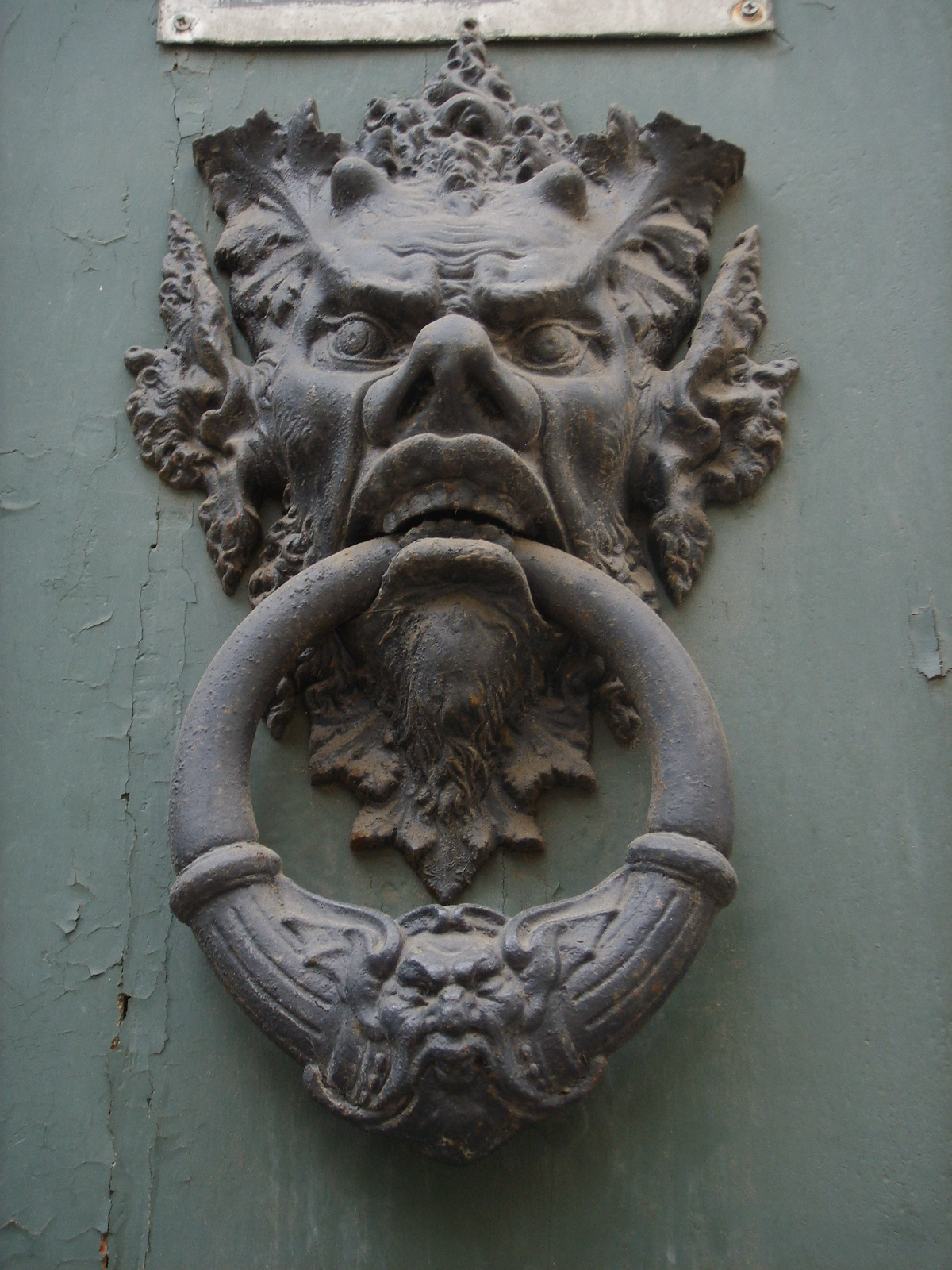 Palazzo Pandolfini, battente 02